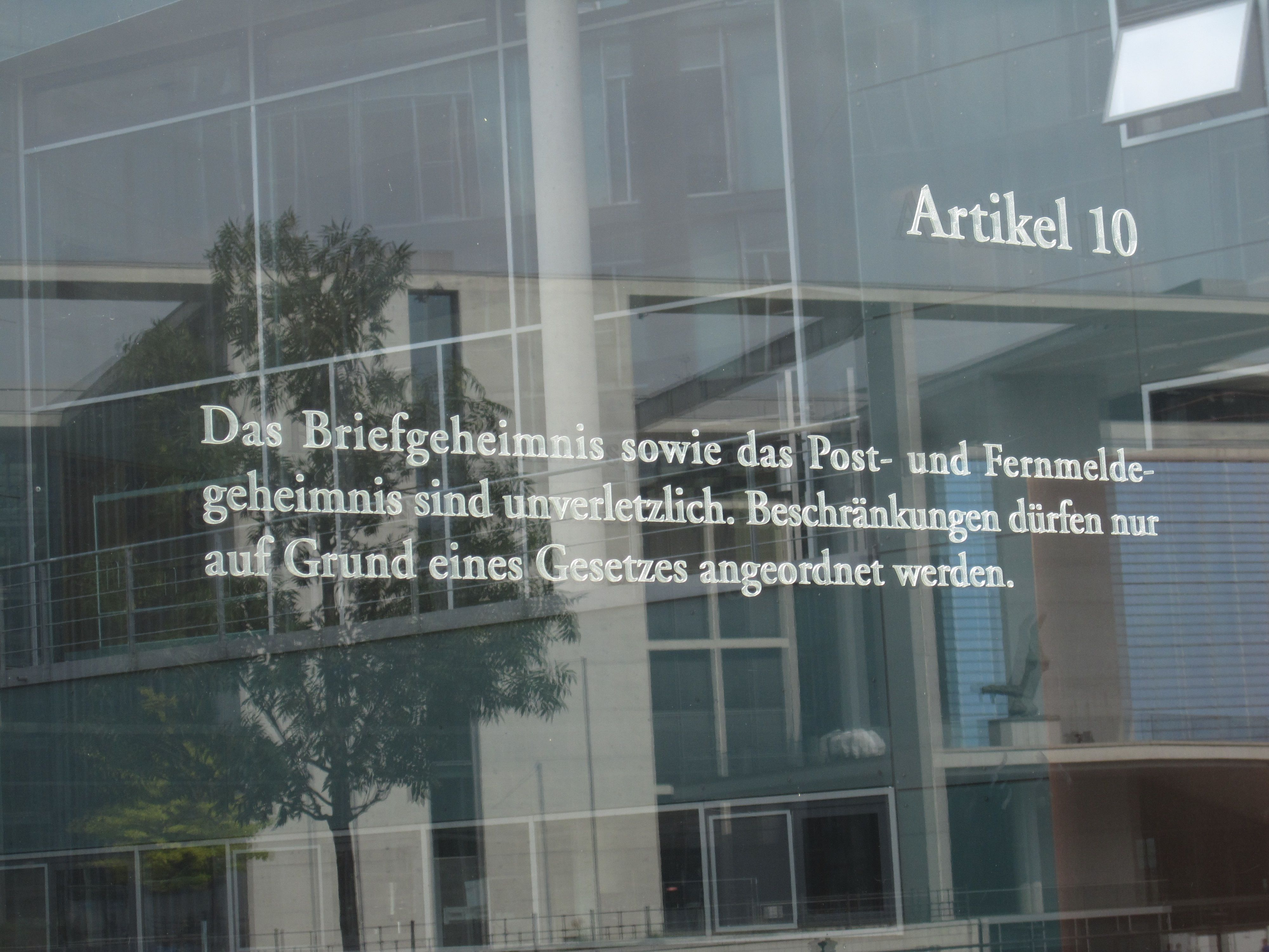 Artikel 10 des Grundgesetzes in der Fassung des Grundgesetzes bei seiner Verabschiedung im Jahr 1949. Der israelische Künstler Dani Karavan hat in drei Meter hohe Glasscheiben, die einen Außenhof des Jakob-Kaiser-Hauses im Uferbereich zu Spree begrenzen, die 19 Grundrechtsartikel des Grundgesetzes mit Laser eingraviert. „Die Grundrechtsartikel schweben gleichsam in Augenhöhe vor dem Haus der Fraktionen, dem Jakob-Kaiser-Haus“ (Andreas Kaernbach, Deutscher Bundestag).